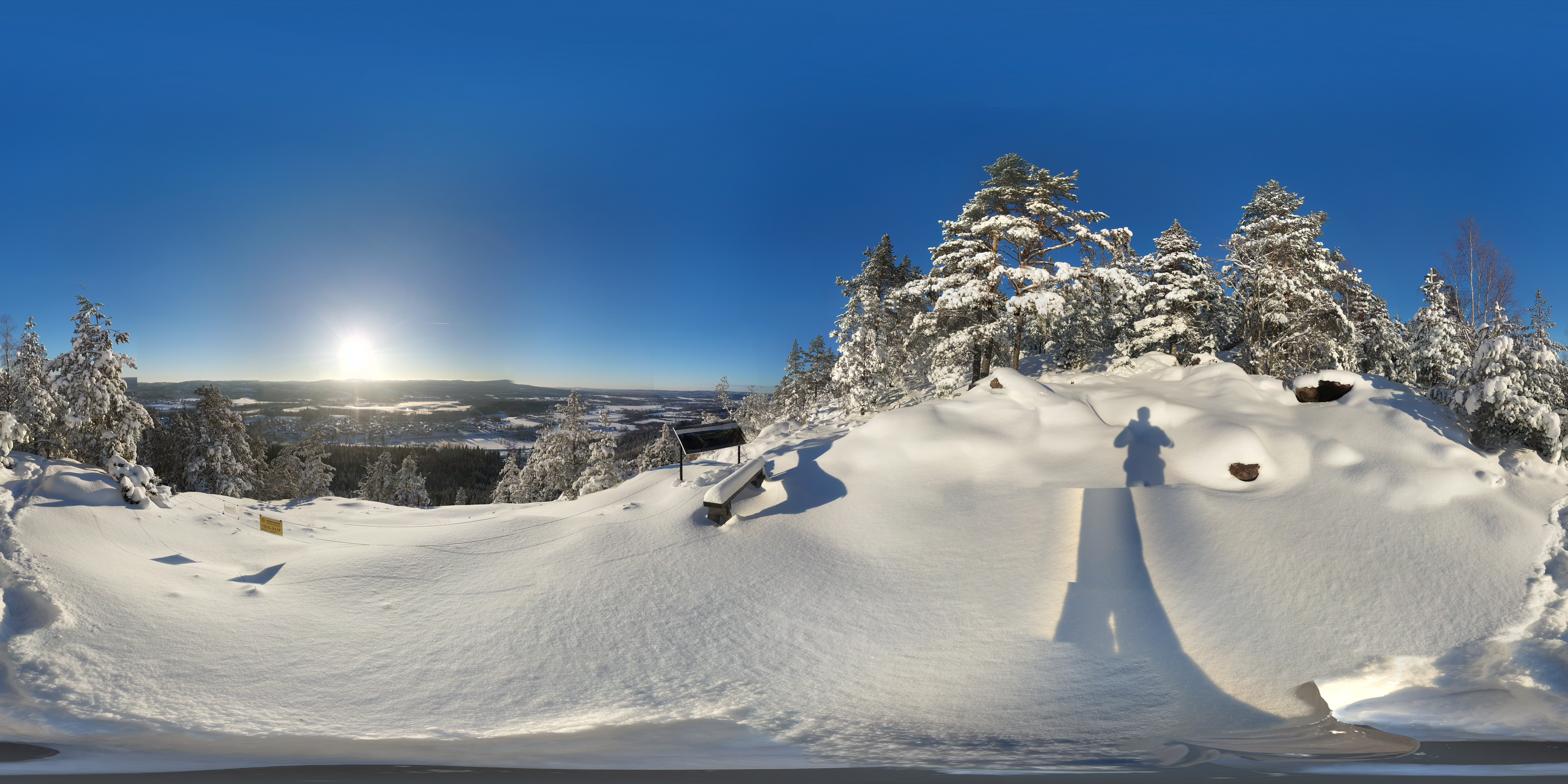 Vy från utsiktsplatsen ovanför den stora rasbranten januari 2017 Fotot är avsett för 360º visning